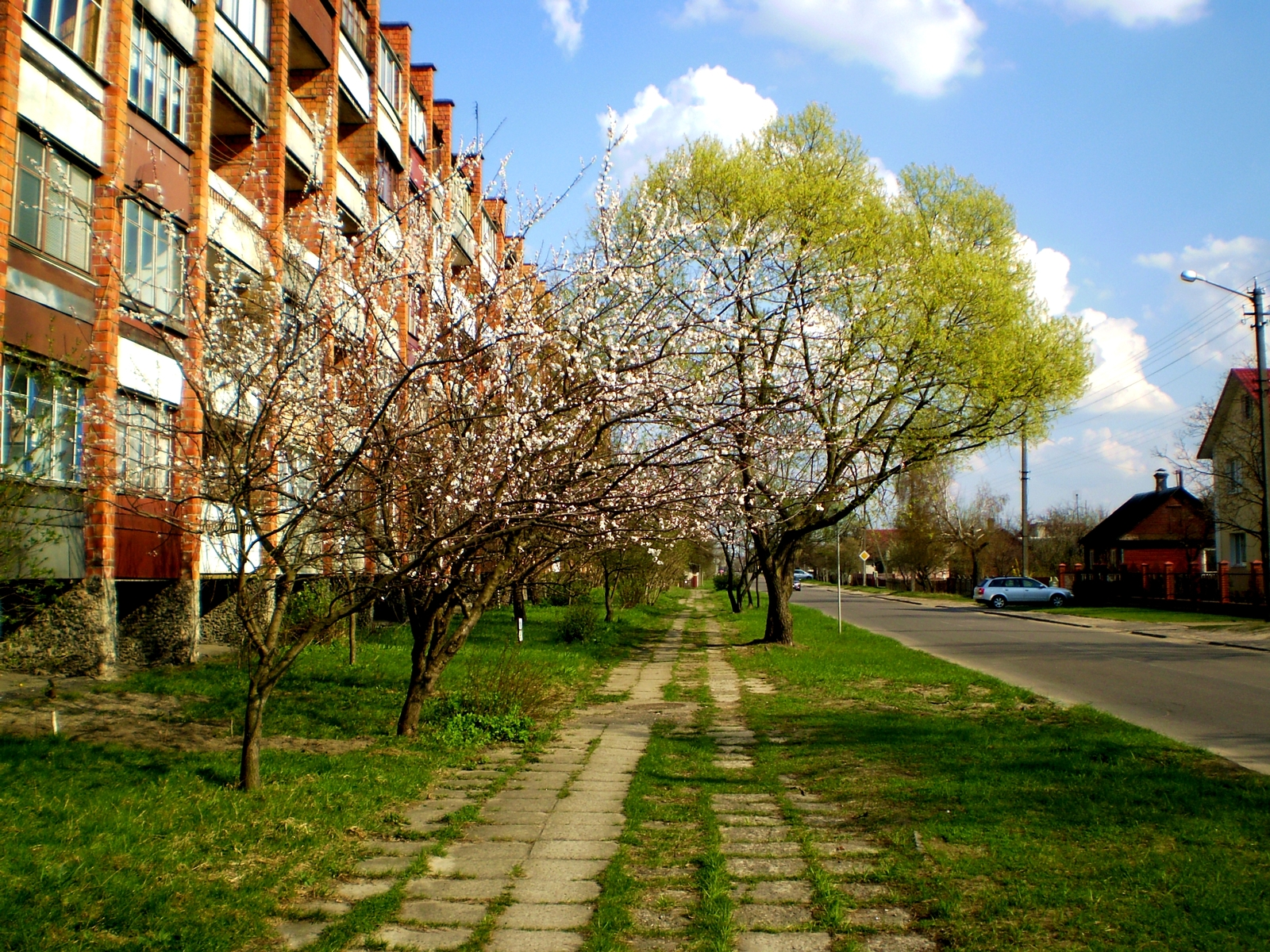 Пешаходная дарожка па вул. Дворнікава